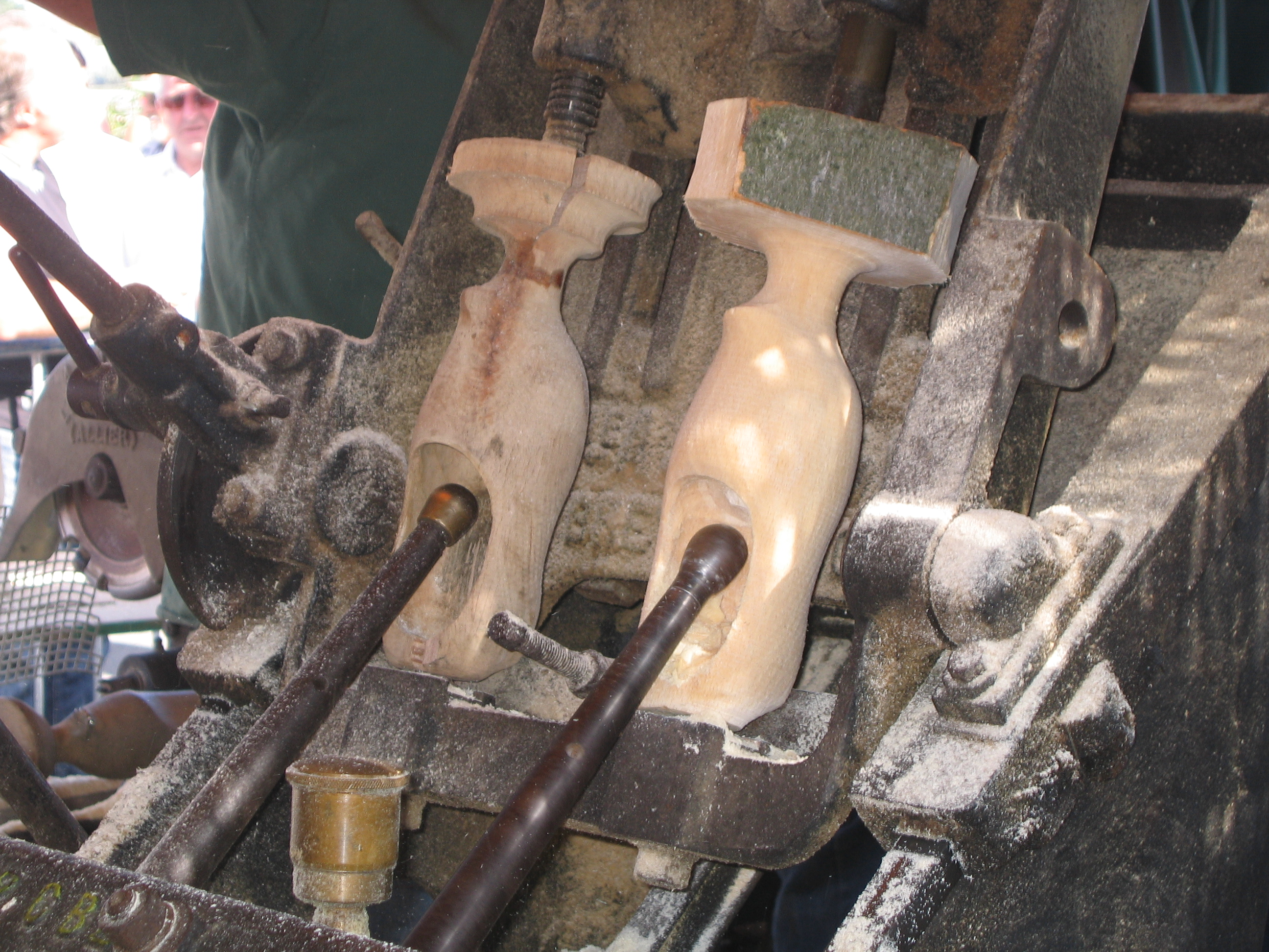 Etape de la fabrication mécanisée d'un sabot.